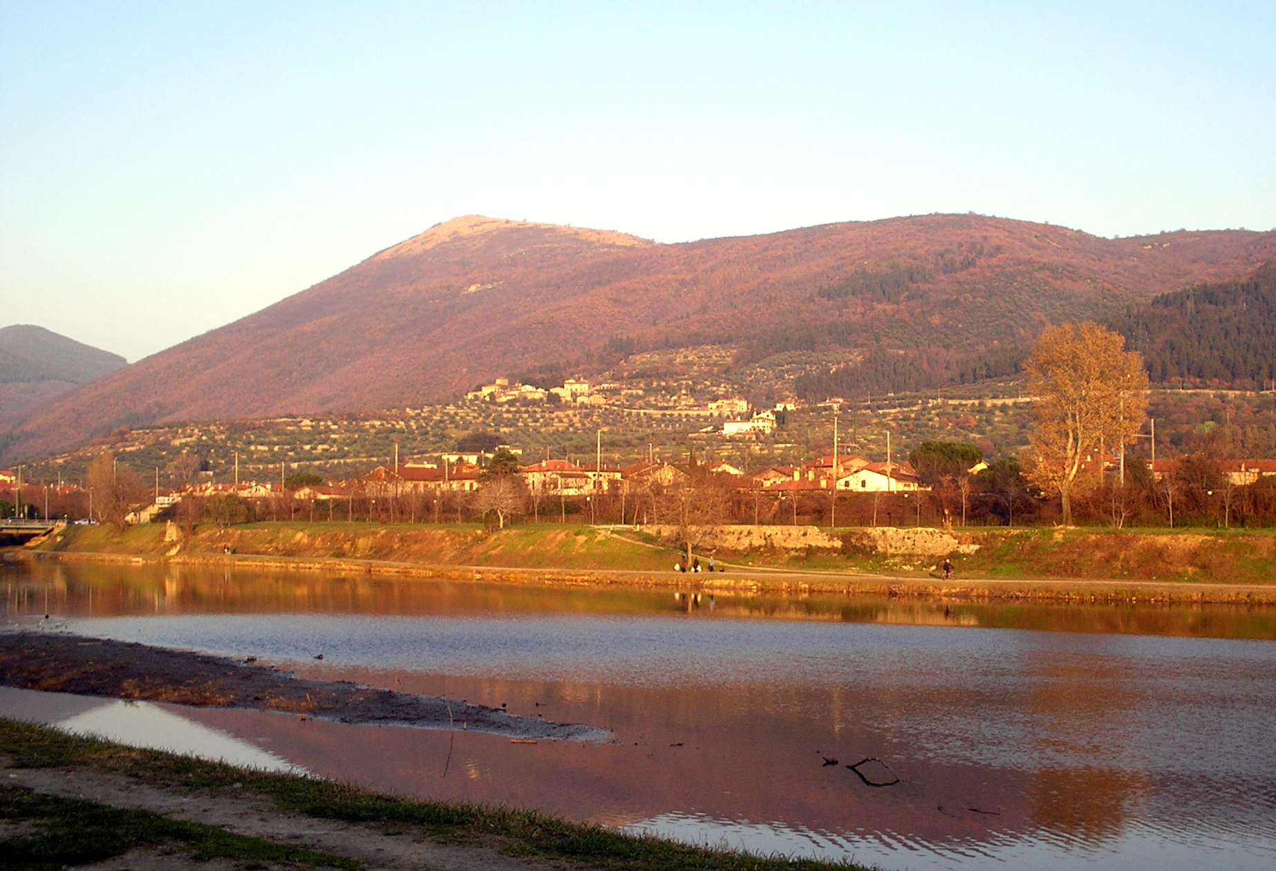 Il monte della Retaia visto da Viale Galilei